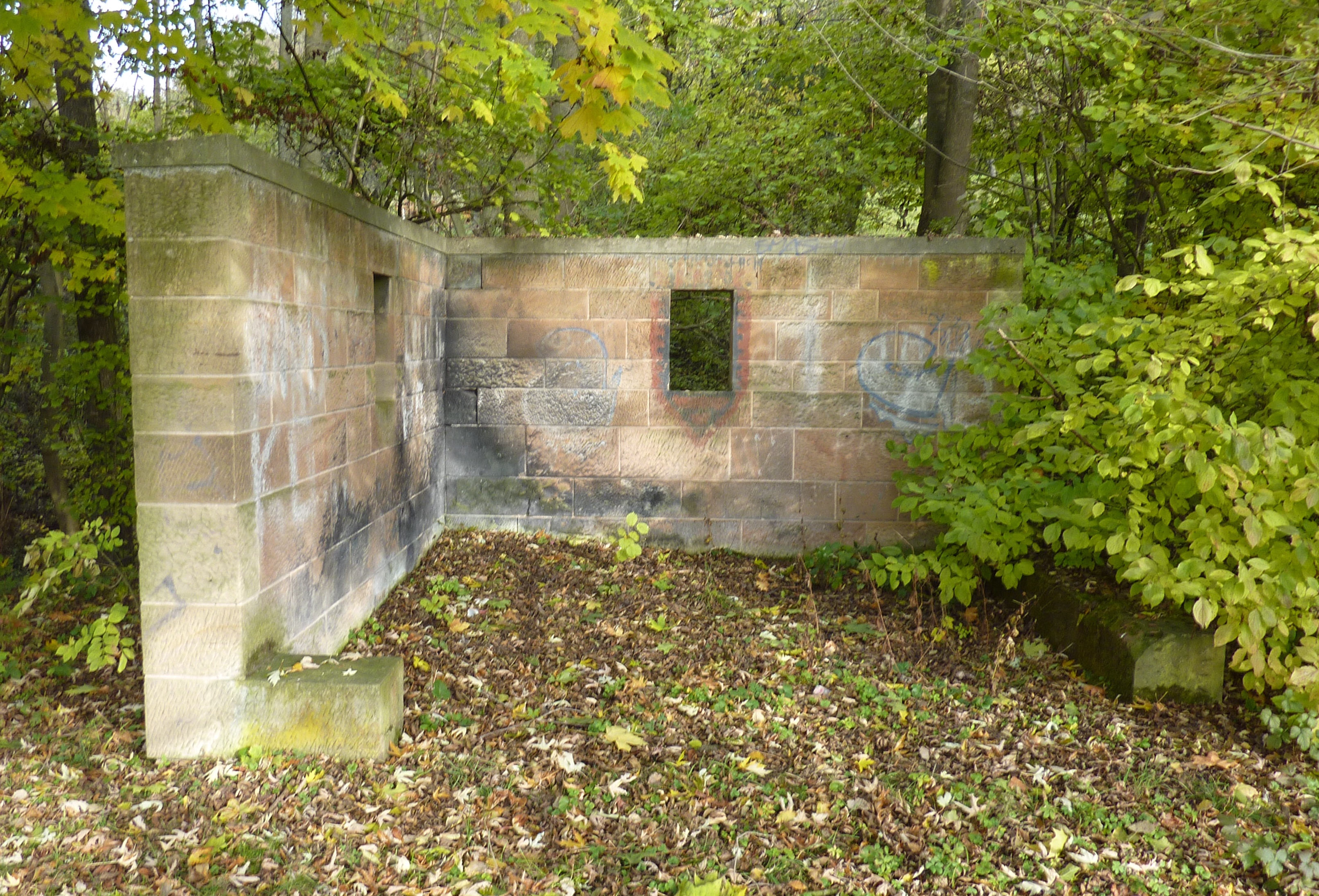 ehemaliges Leberbrunnenhäusle?